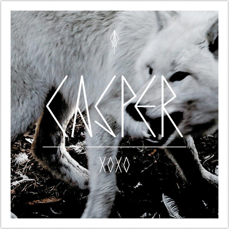 Cover des Albums „XOXO“